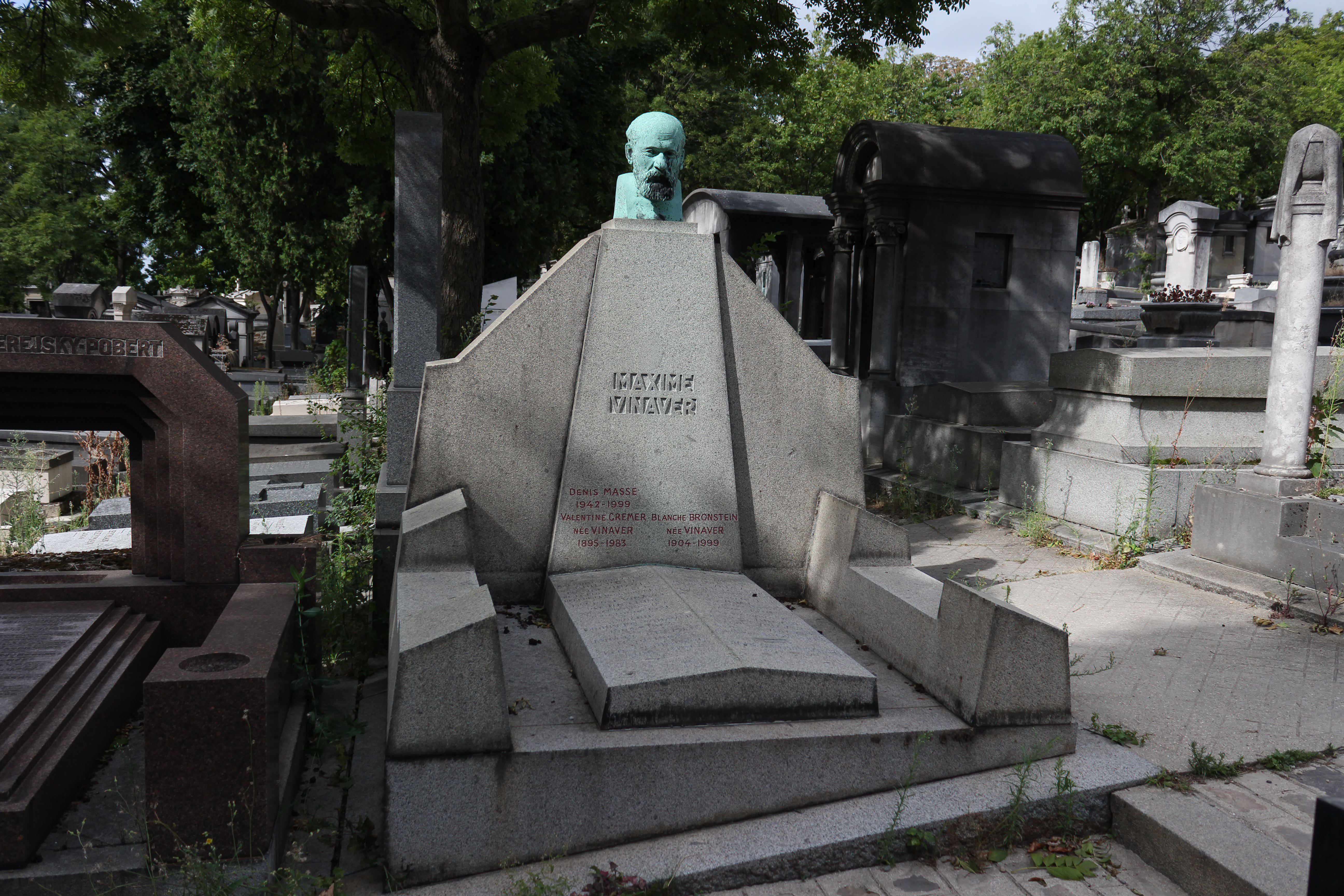 Sépulture de la famille Vinaver dont l'avocat russe Maxime Vinaver (1863-1926), faisant partie des douze juifs membres de la première Douma (avril à juin 1906), président du Folksgrupe et co-fondateur du parti politique libéral de l'Empire russe Parti constitutionnel démocratique. La tombe est ornée d'un buste en bronze.